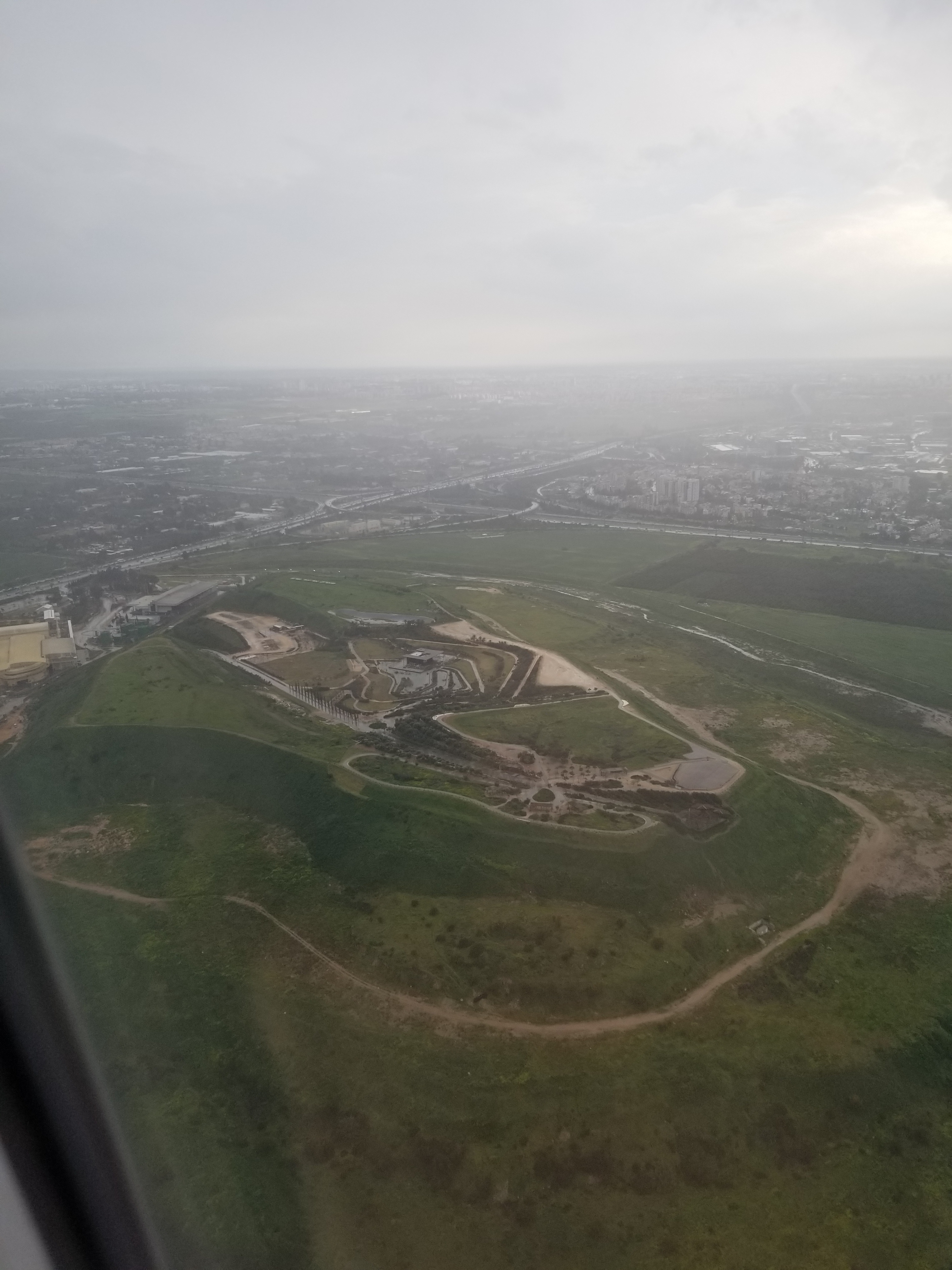 פארק אריאל שרון